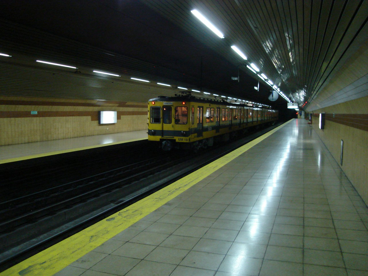 Formación GEE en sentido Bolívar detenida en la estación Emilio Mitre de la línea E de la red de subterráneos de Buenos Aires.